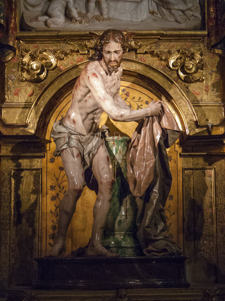 03082013 174511 SALAMANCA 0412